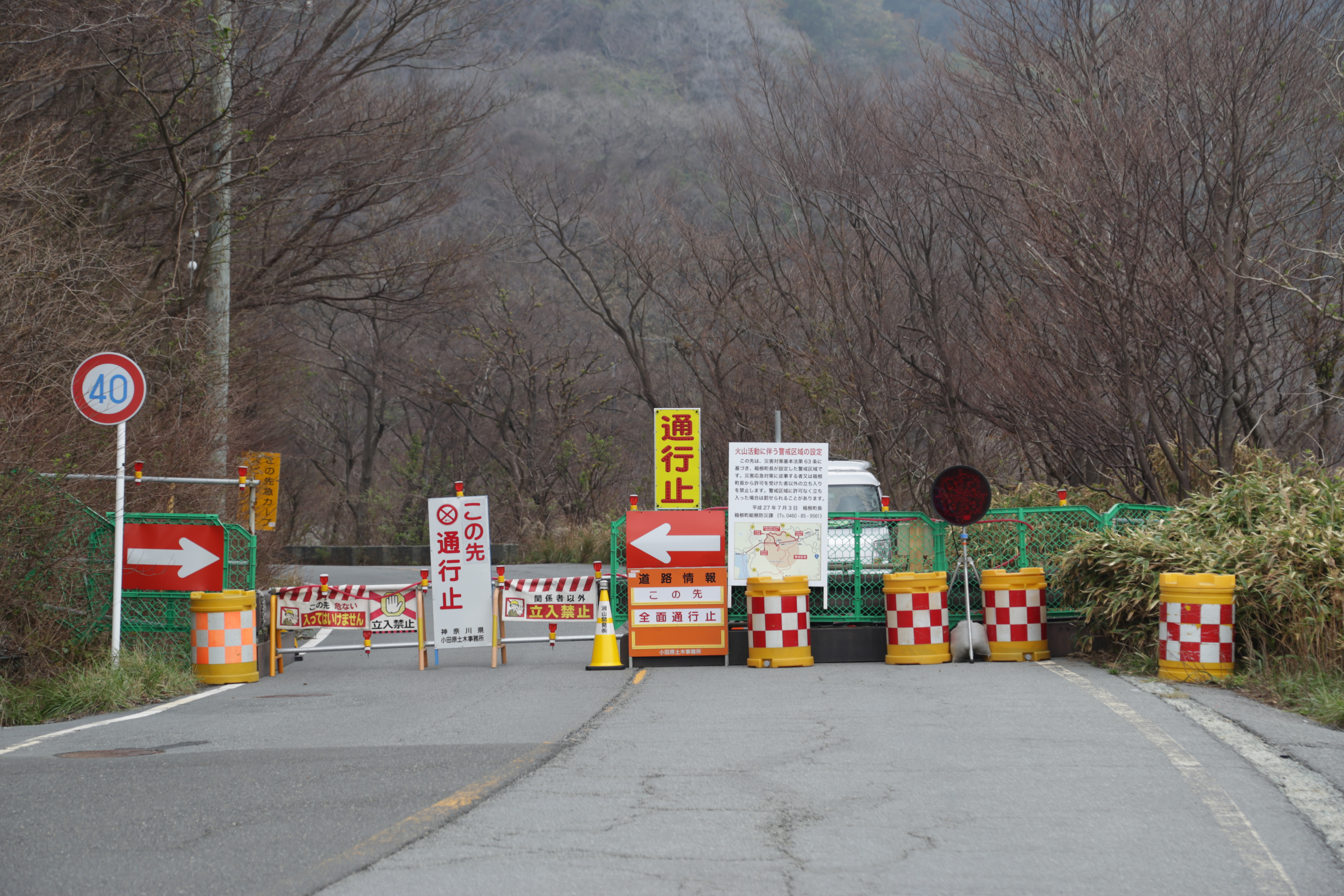 大涌谷噴火の影響で閉鎖となった神奈川県道734号大涌谷小涌谷線